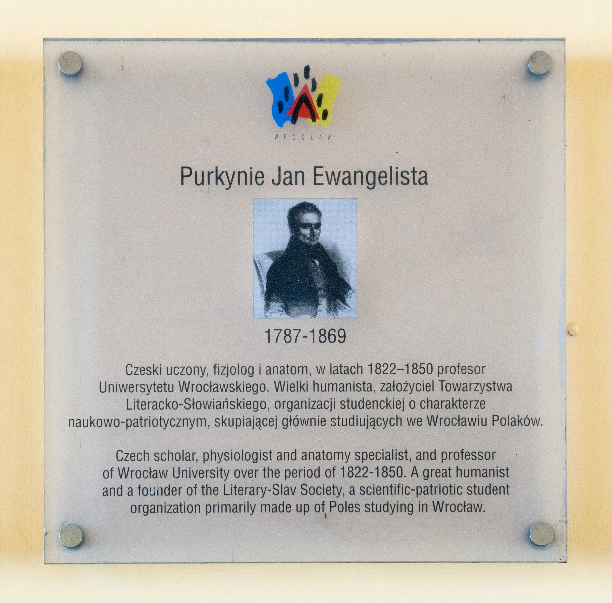 Tablica pamiątkowa Jana Evangelisty Purkyně na budynku Uniwersytetu Wrocławskiego.